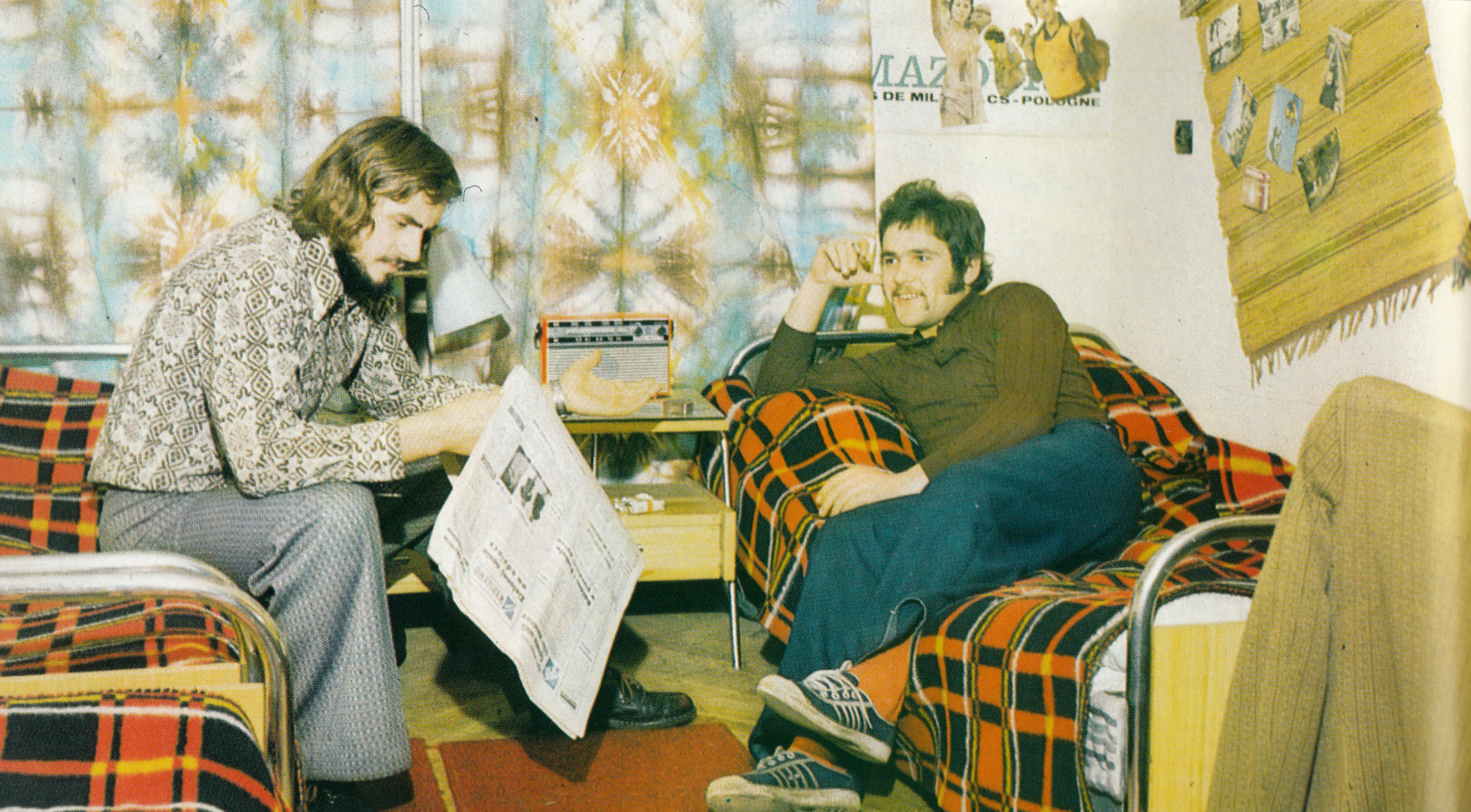 Mieszkańcy hotelu robotniczego na Woli w Warszawie